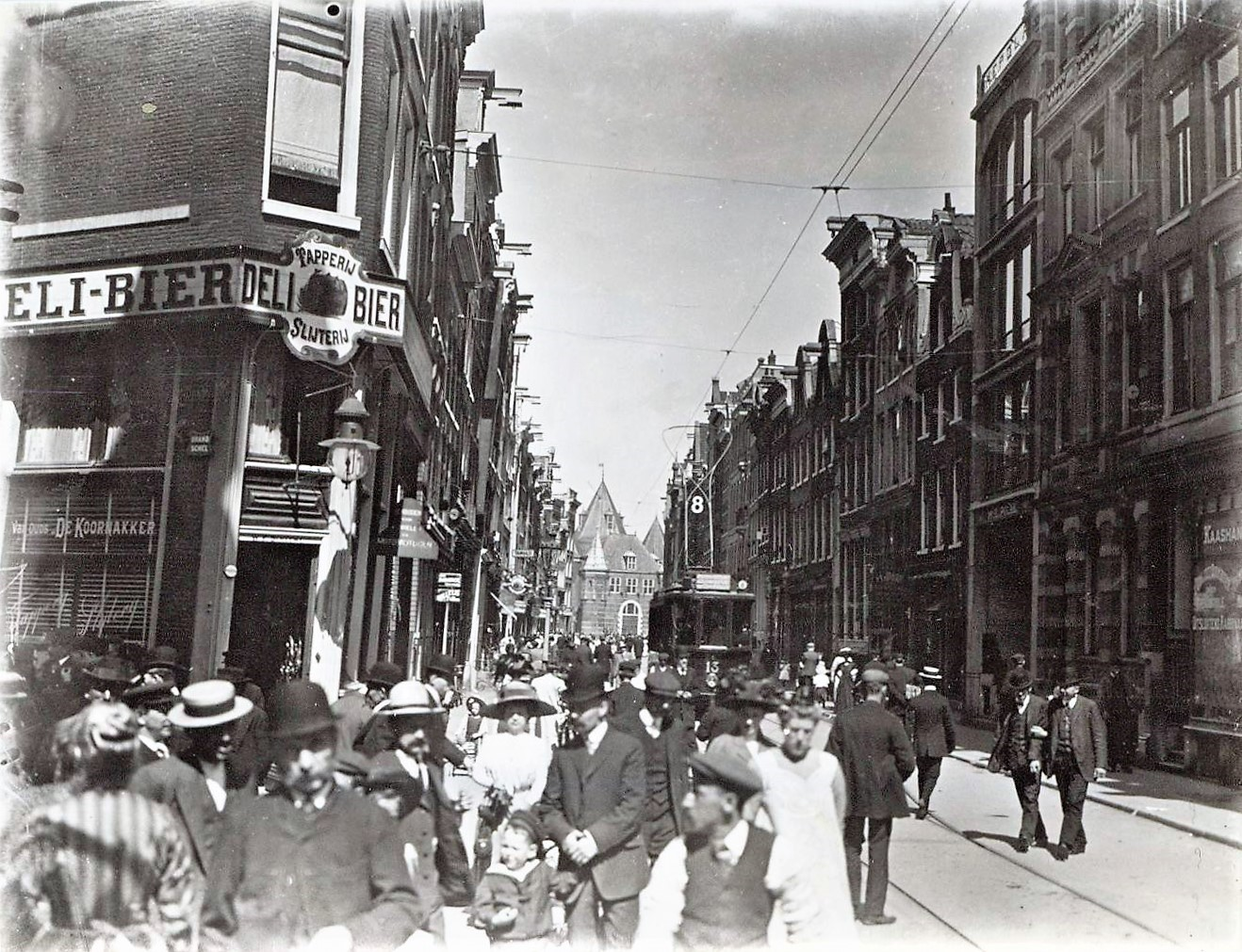 Sint Antoniesbreestraat 70-hoekhuis links. Links: ingang Nieuwe Hoogstraat. Op de achtergrond: Nieuwmarkt met De Waag. Midden: tram van lijn 8 (motorwagen 13).